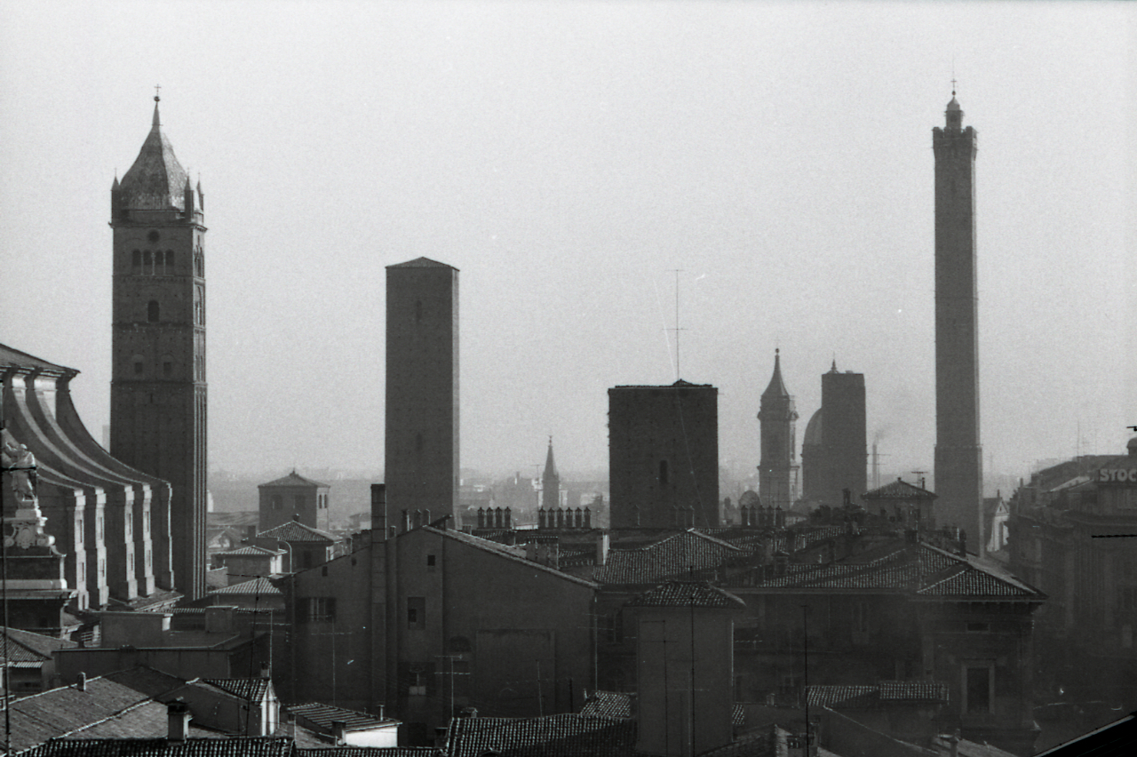 Servizio fotografico : Bologna, 1965 / Paolo Monti. - Strisce: 3, Fotogrammi complessivi: 13 : Negativo b/n, gelatina bromuro d'argento/ pellicola ; 35 mm. - ((I fotogrammi hanno una doppia numerazione. - Sul portanegativi: Leica Agfa 21. - Occasione: Pubblicazione: "Emilio CECCHI, Natalino SAPEGNO (a cura di), Storia della Letteratura Italiana, 9 voll., Milano, Garzanti, 1966 e segg."